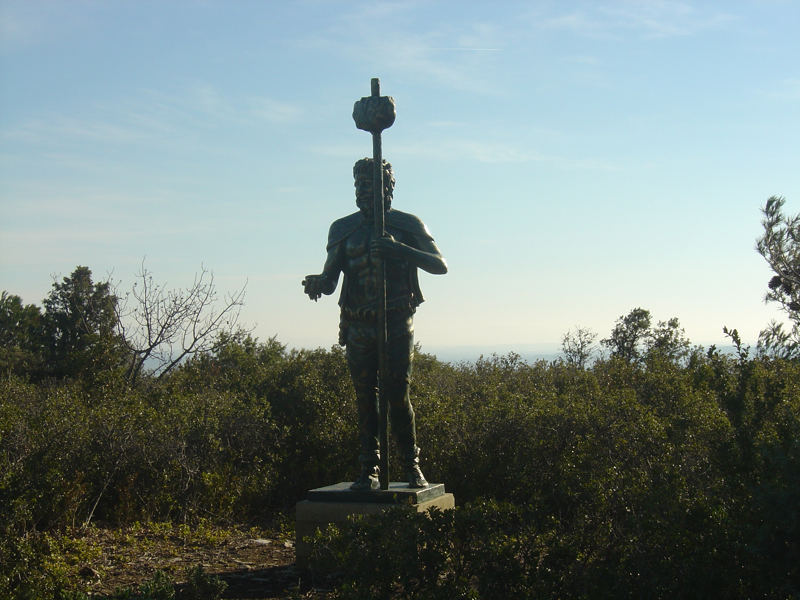 Statue récente au Camp de César: Sucellus, dieu gaulois pastoral, protecteur des troupeaux et des récoltes et détenteur de la prospérité. Un petit autel votif dédié à cette divinité a été retrouvé sur le Camp de César au XIXème siècle, témoignant de son culte dans la cité gauloise.